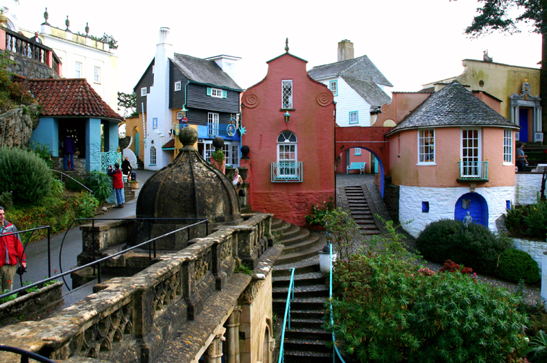 Portmeirion